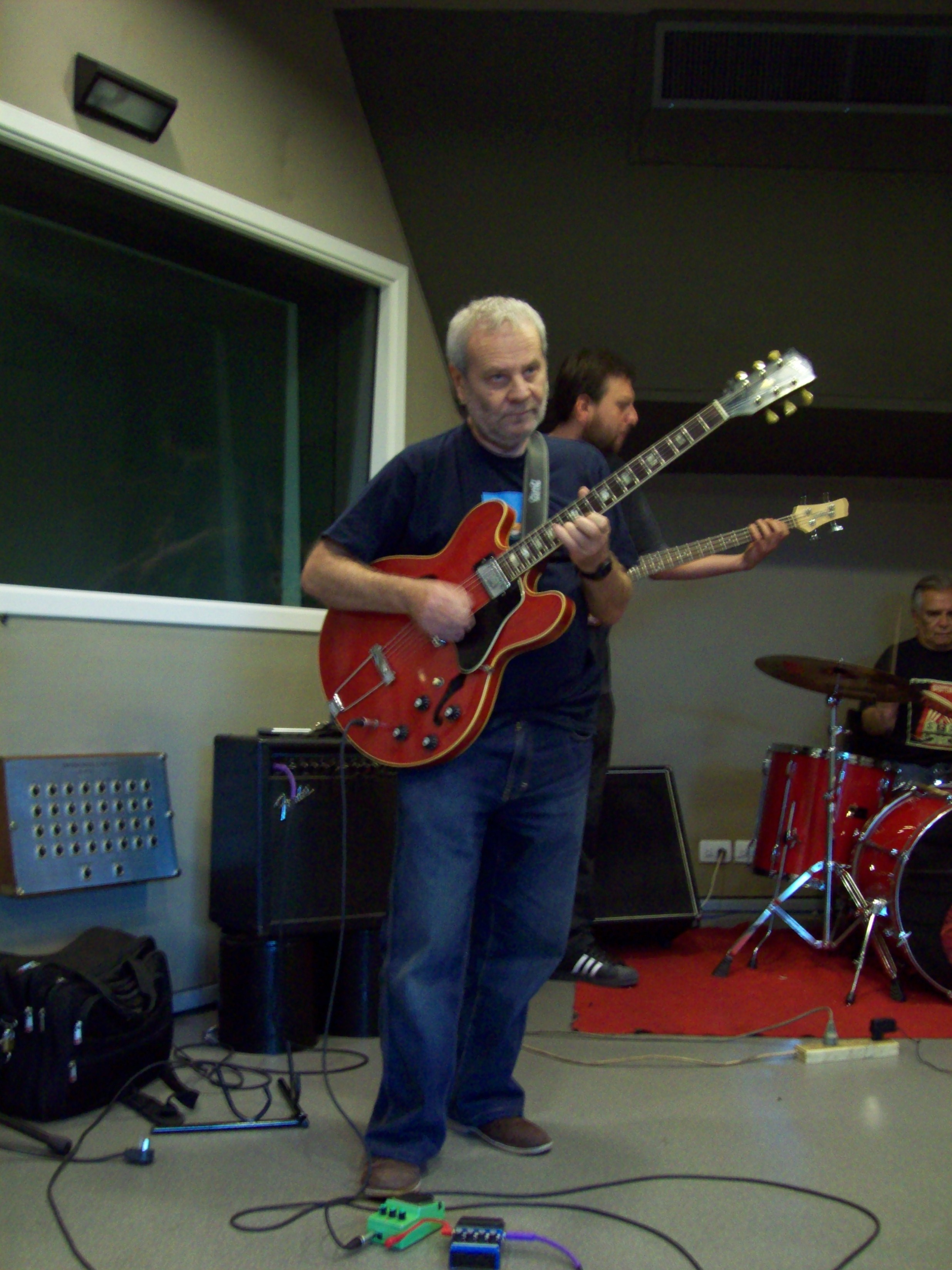 Claudio Gabis, Frans Banfield, Gustavo Giannini ensayando en la sala Norberto Napolitano en la Rock & Pop.